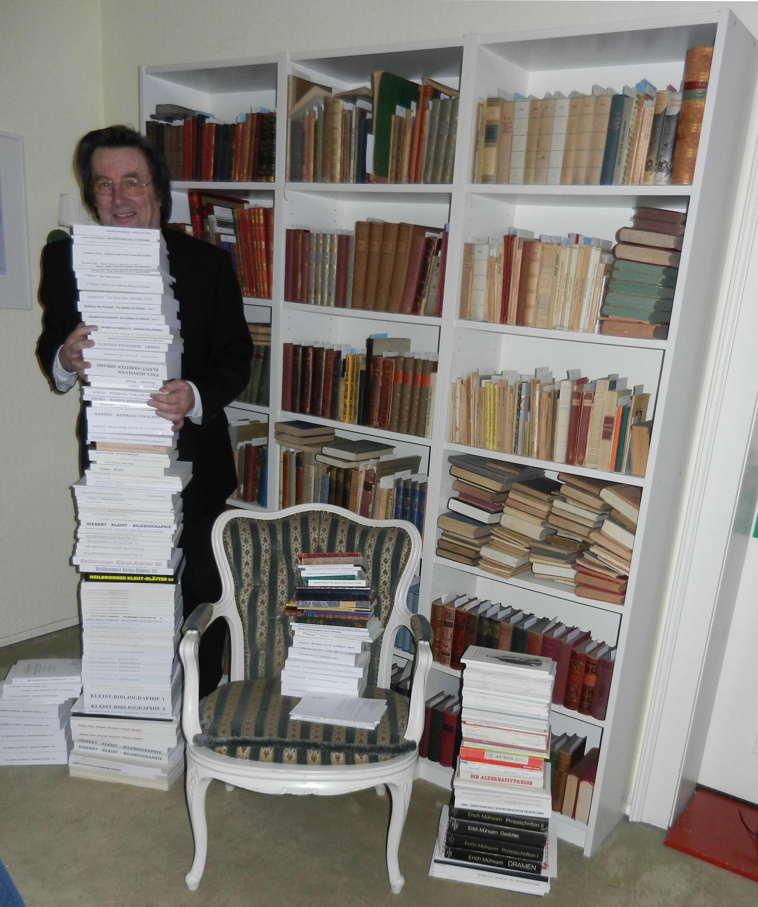 3 lfdm von Günther Emig herausgegebene Bücher, Stand 2013-02_08